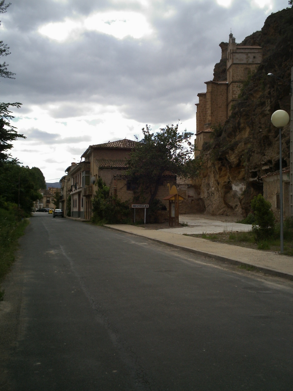 Inestrillas, La Rioja (España)